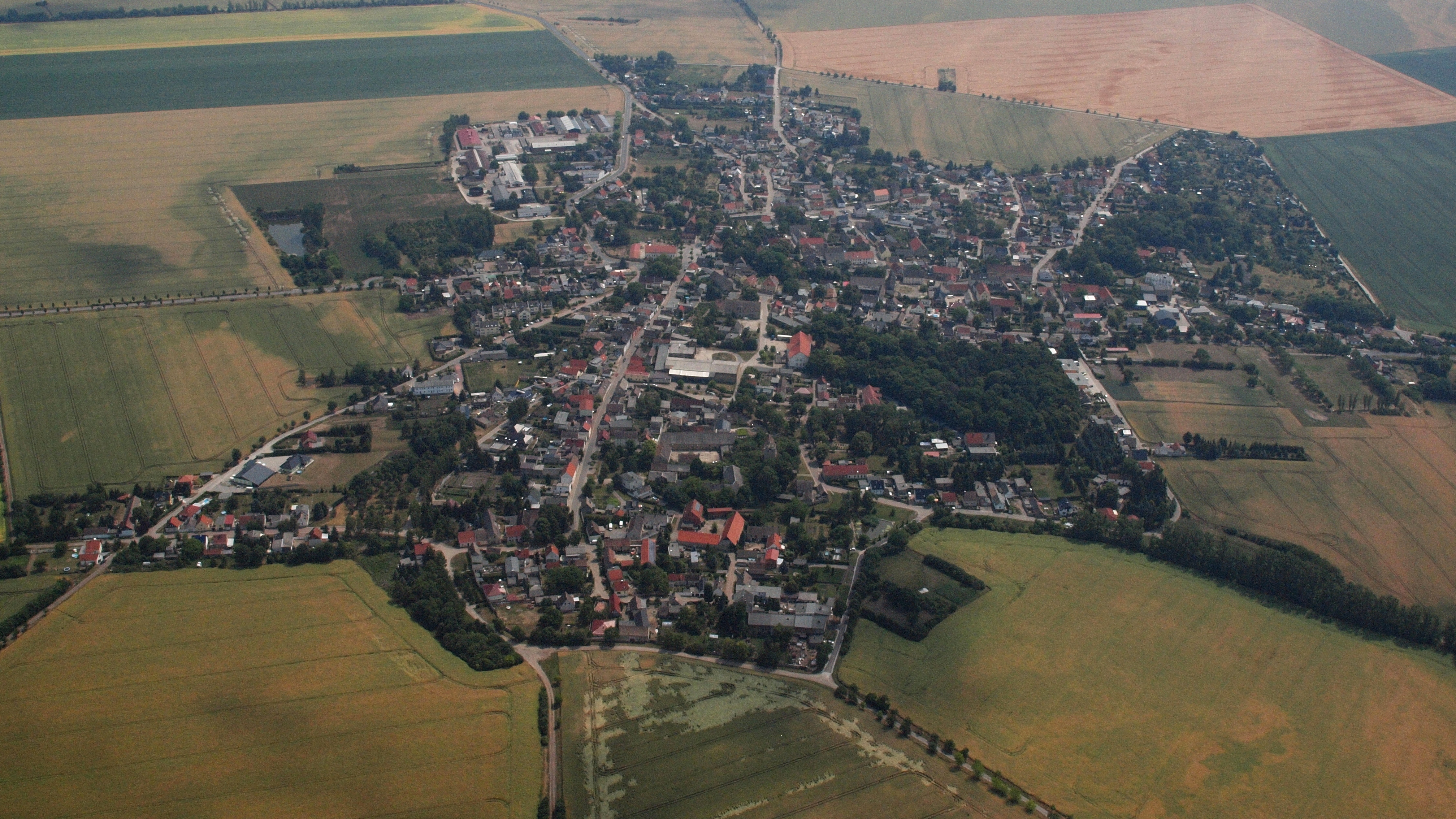 Borne, Luftaufnahme (2015)